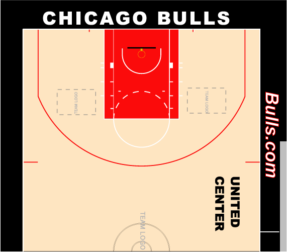 ブルズ、ホームコート配色